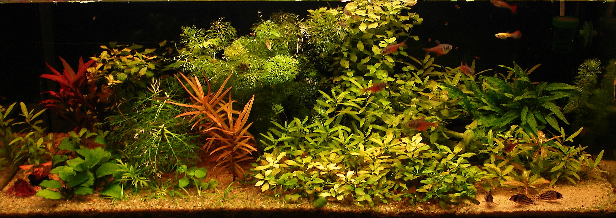 hollandais